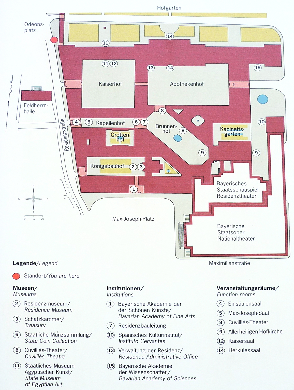 Grundriss der Residenz München (Bayerische Schlösserverwaltung).